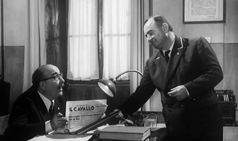 Luigi Pavese and Ciccio Barbi in a scene of the film Il mio amico Benito